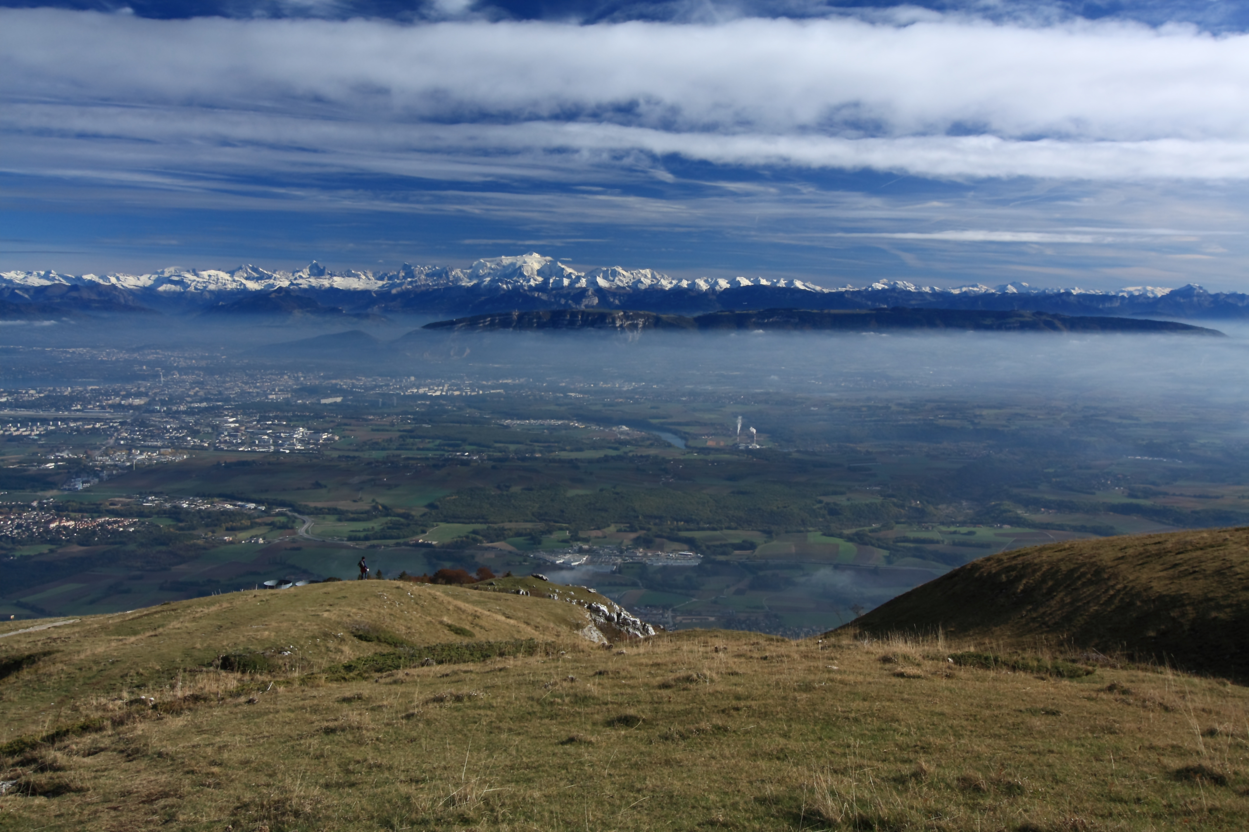 + grand